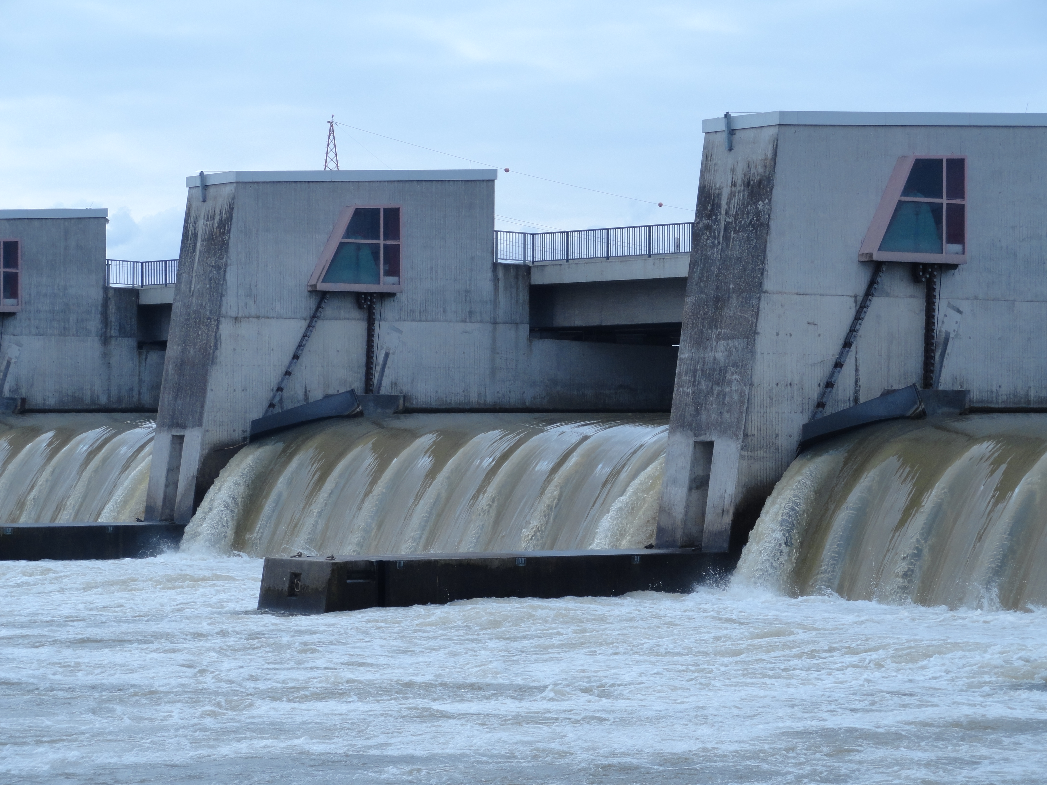 Wehr der Staustufe Straubing; die Felder mit gesenkten Kappen werden überströmt